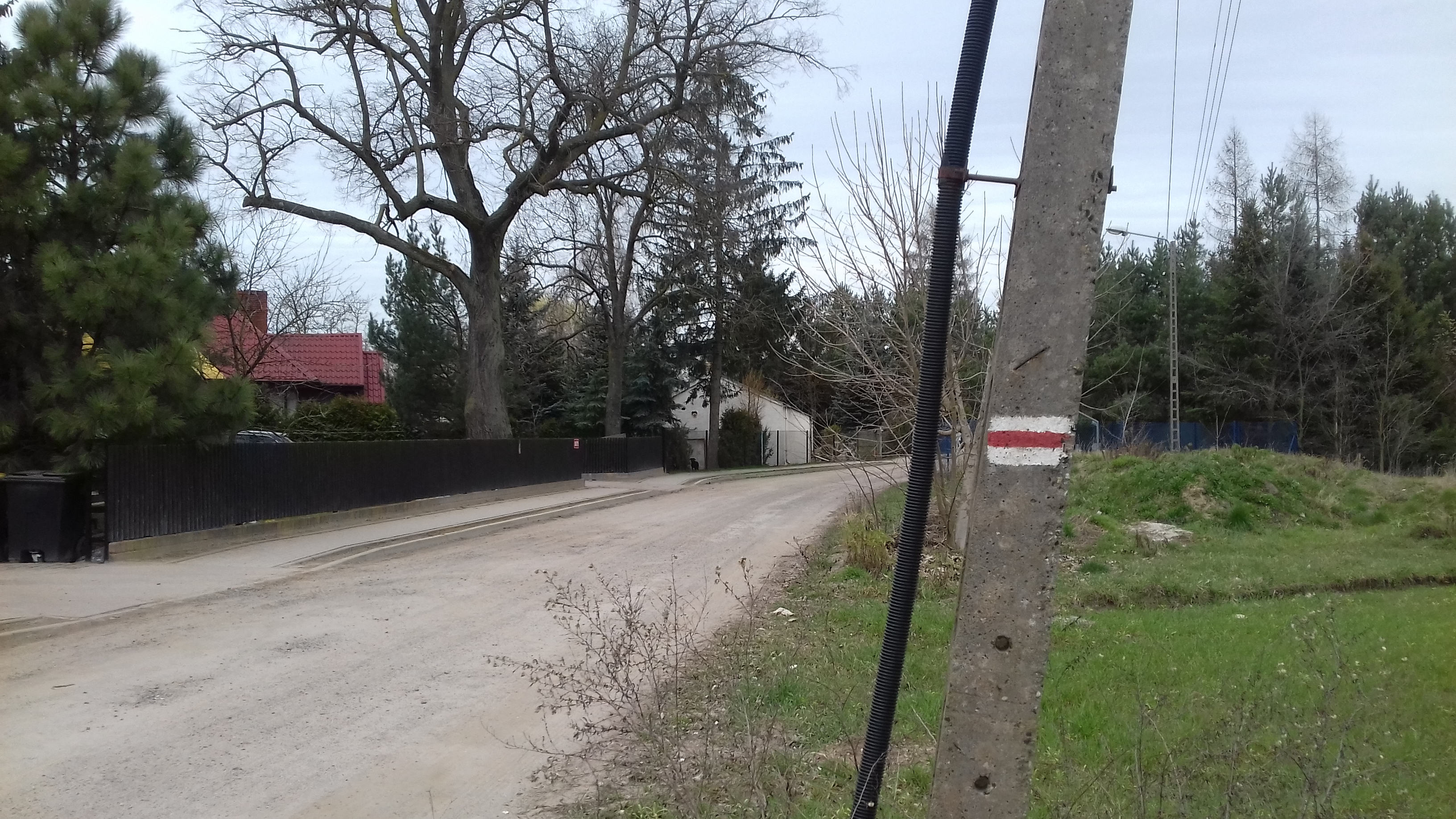 Oznaczenie szlaku pieszego nr 3578 (czerwonego) w Baranówku przed siedzibą sołtysa wsi.